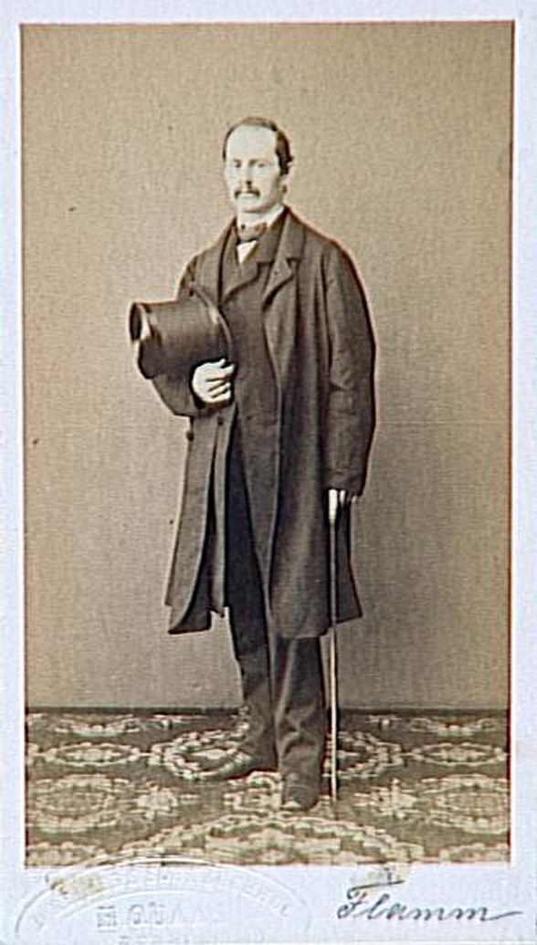 Fotografie von Albert Flamm, Arnold Overbeck, Gebr. G. & A. Overbeck in Düsseldorf